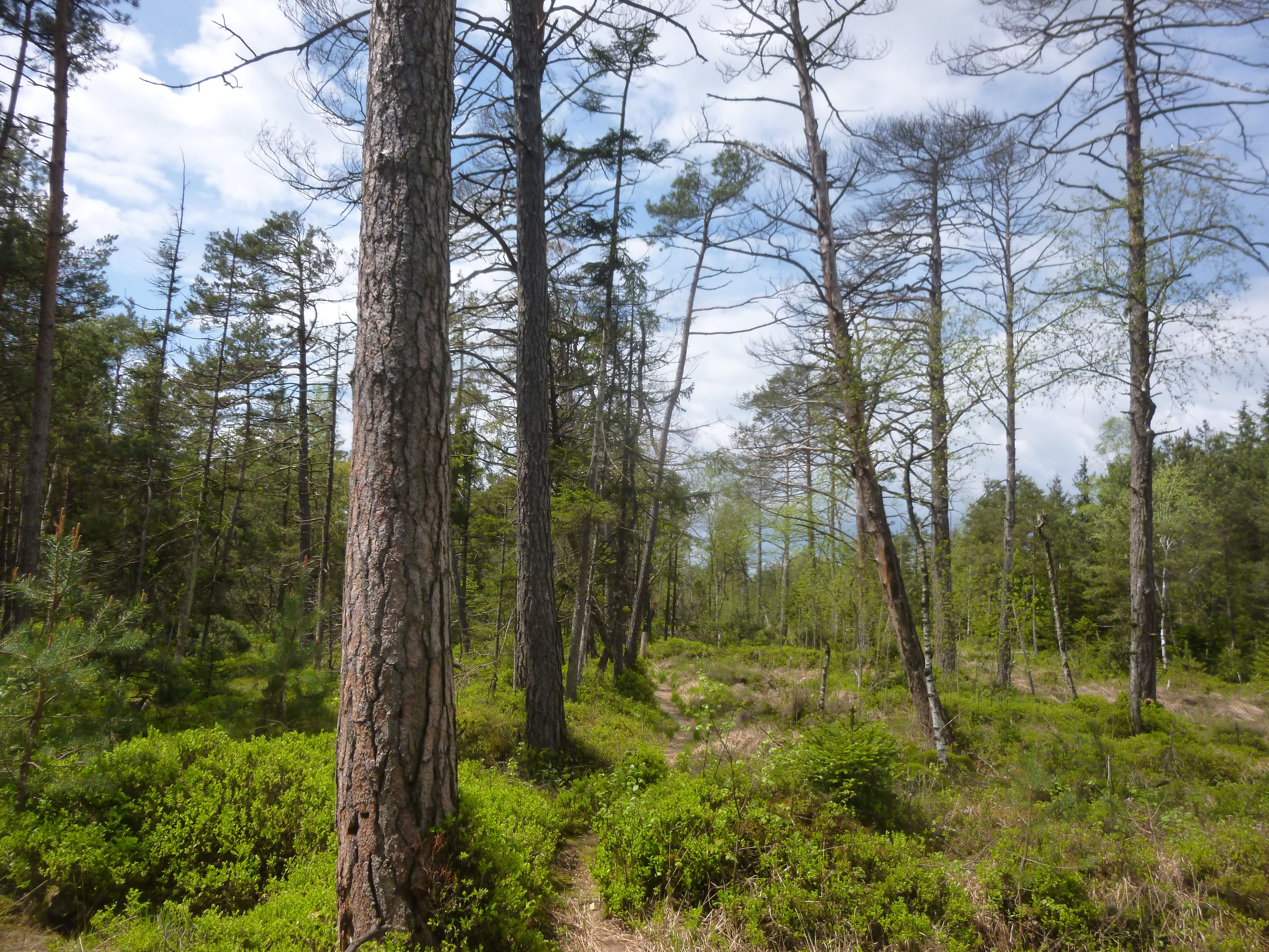 Weg durch das Naturschutzgebiet "Murner Filz" bei Wasserburg am Inn. Man sieht hierbei deutlich die absterbenden Kiefern, was durch die Wiedervernässung bzw. Renaturierung ausdrücklich gewünscht ist, um den Wald zurückzudrängen und wieder ein Hochmoor mit seinem einzigartigen Artenspektrum entstehen zu lassen.